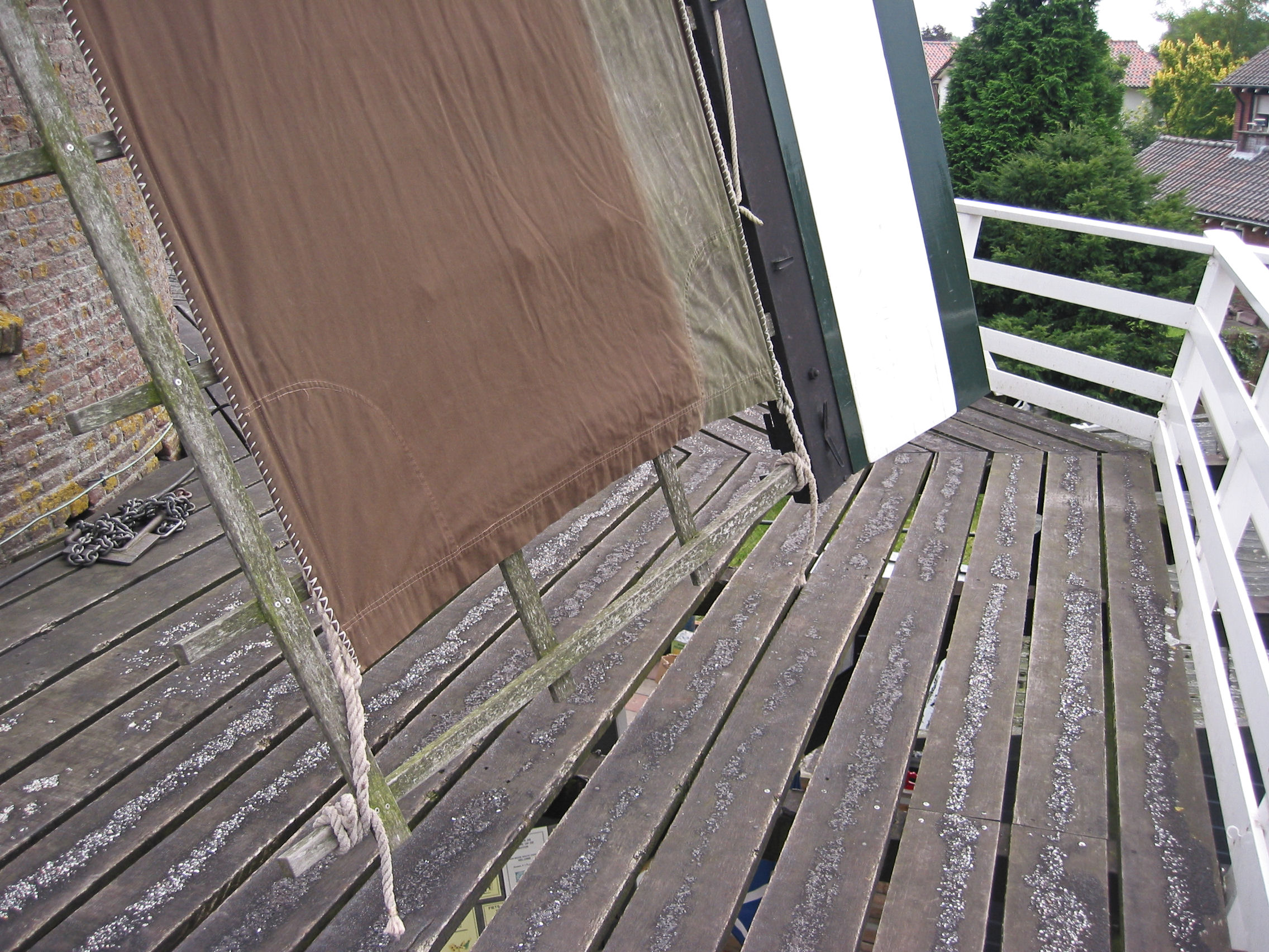 Voorkant molenwiek